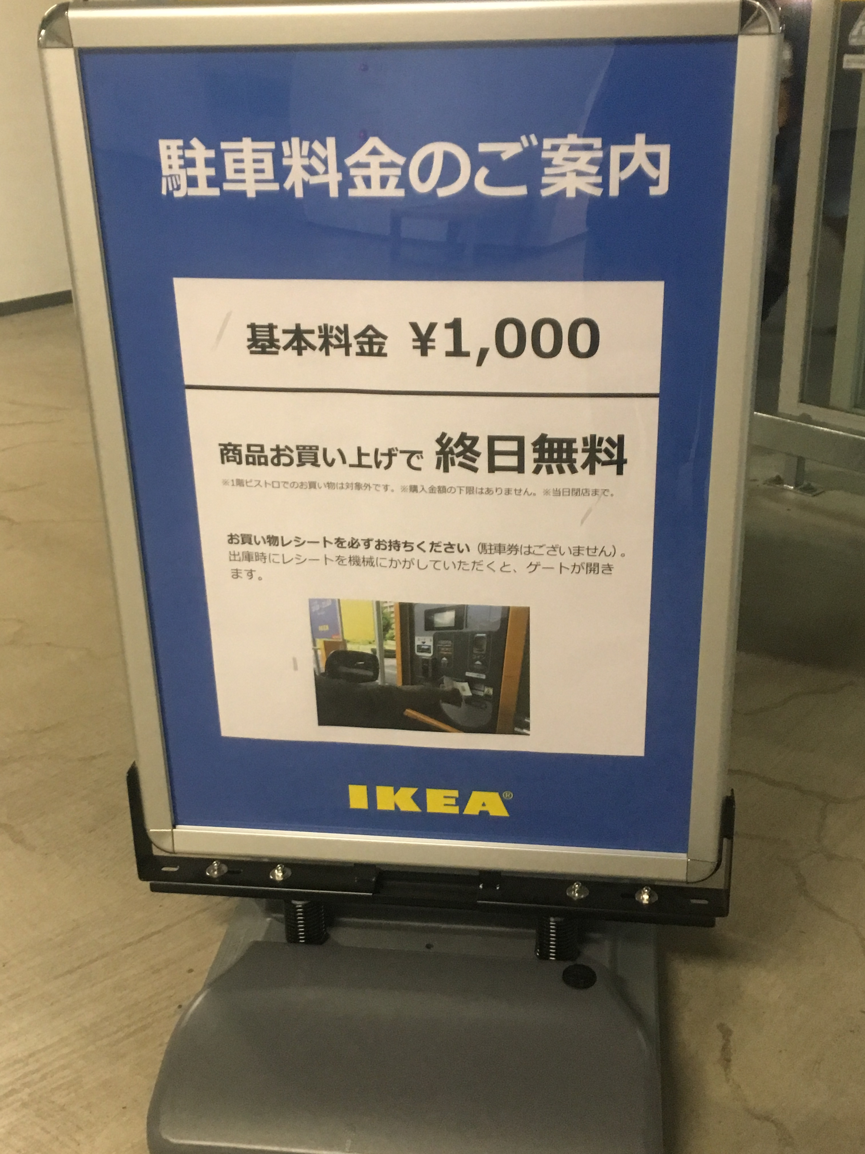 IKEA立川駐車料金の案内(2018年) P1客用入口にて撮影